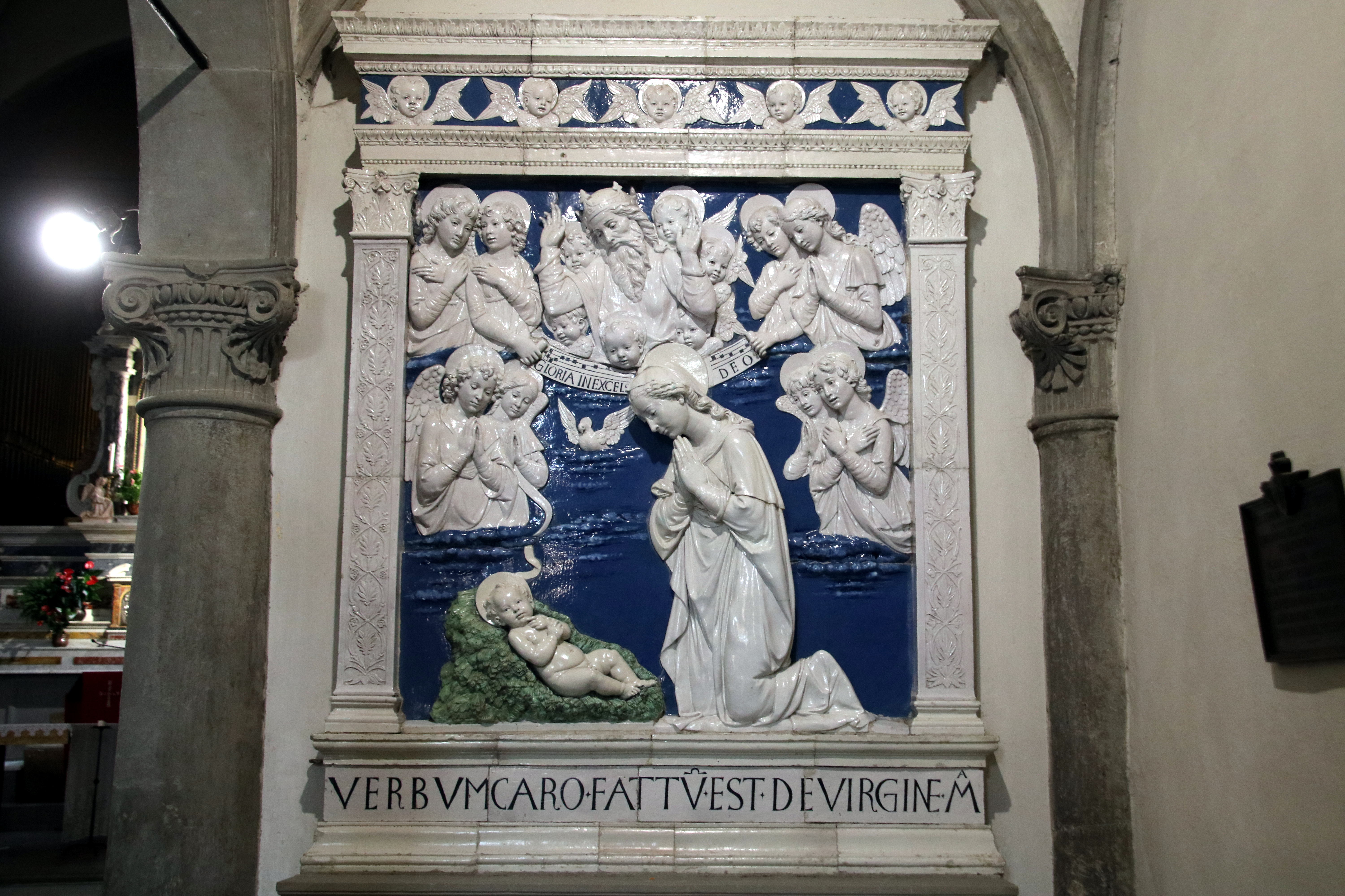 Andrea della Robbia, Natività, 1479, chiesa maggiore (La Verna)